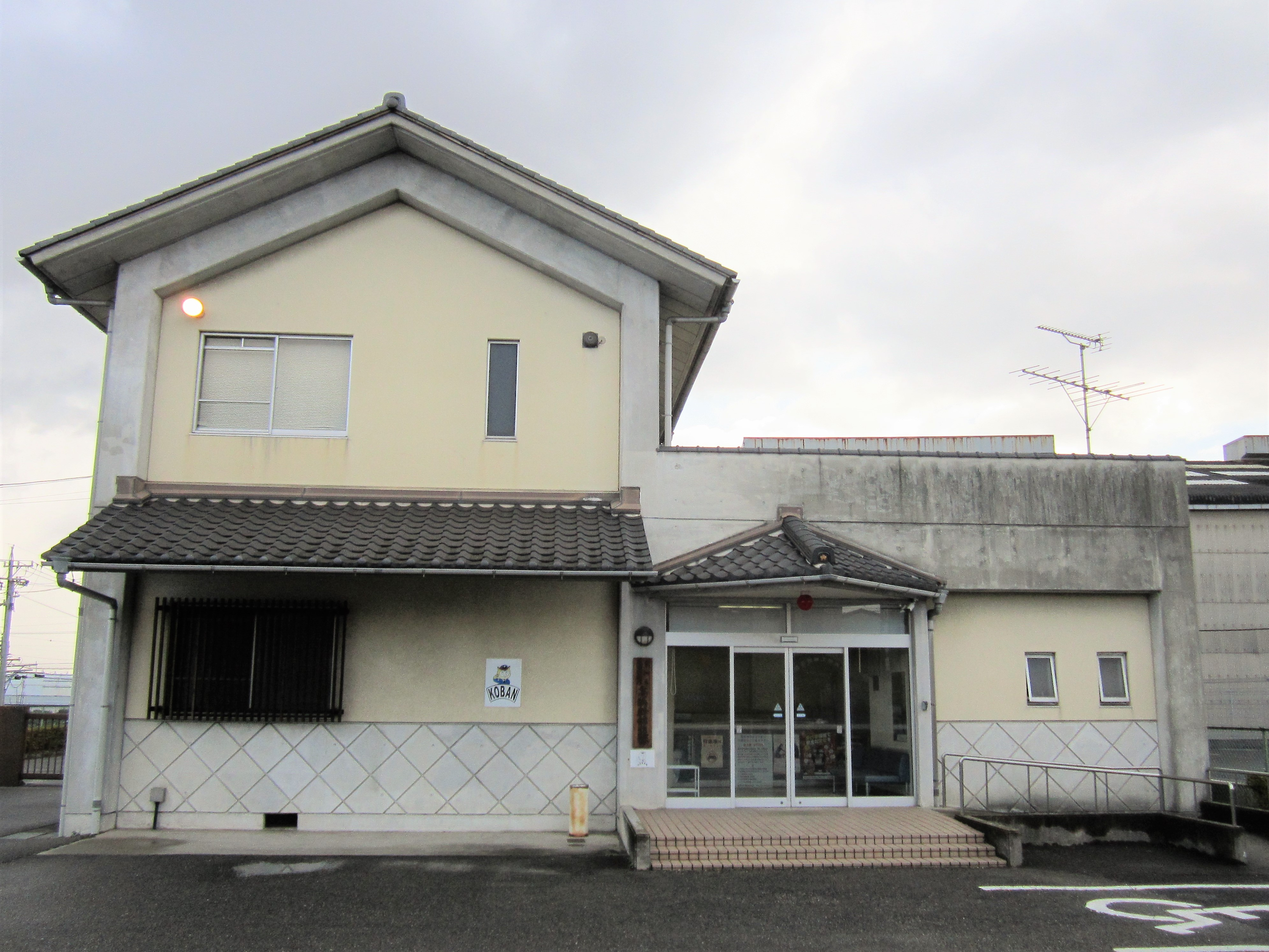 碧南警察署 高浜幹部交番 Canon PowerShot A2200